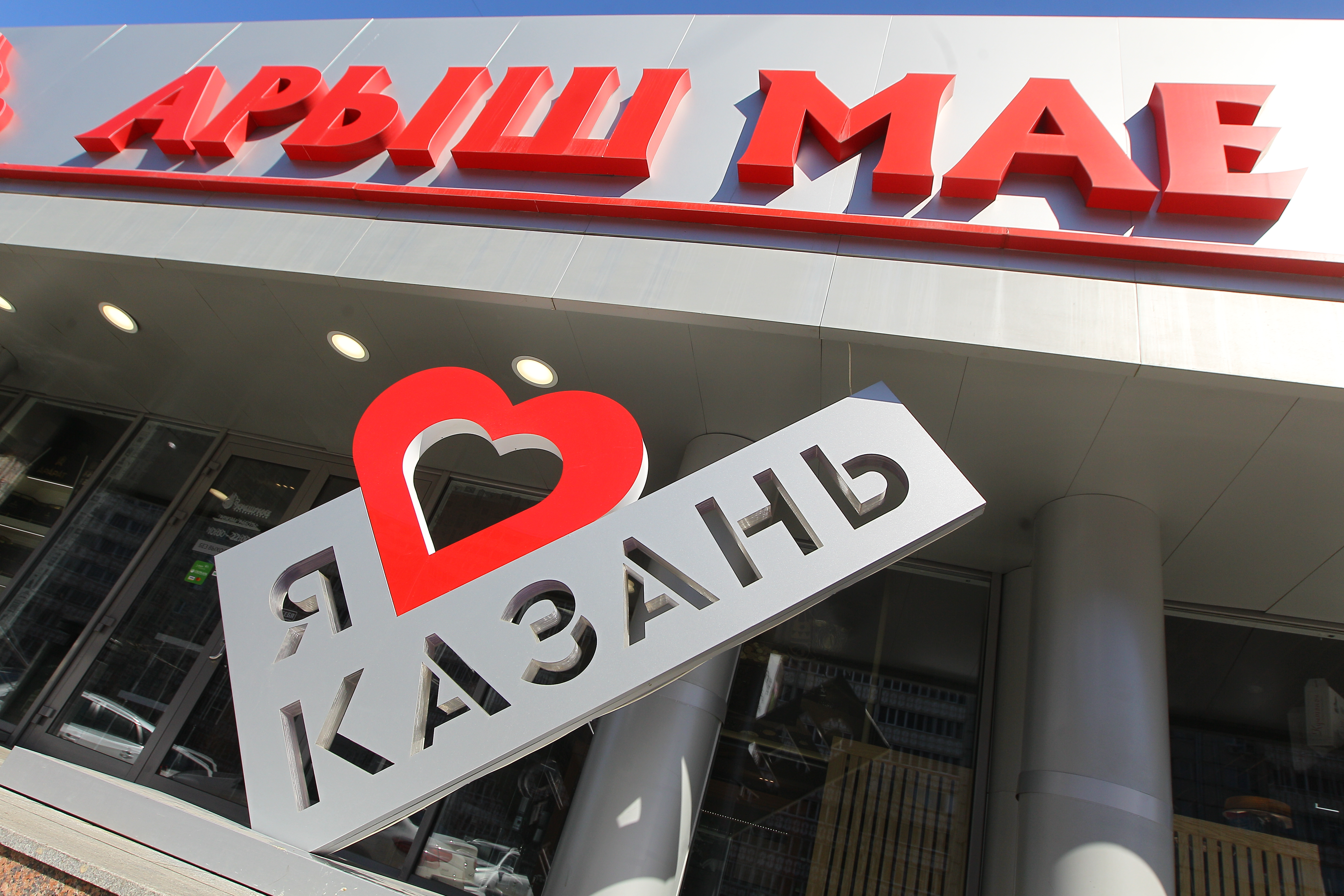 Арыш Мае